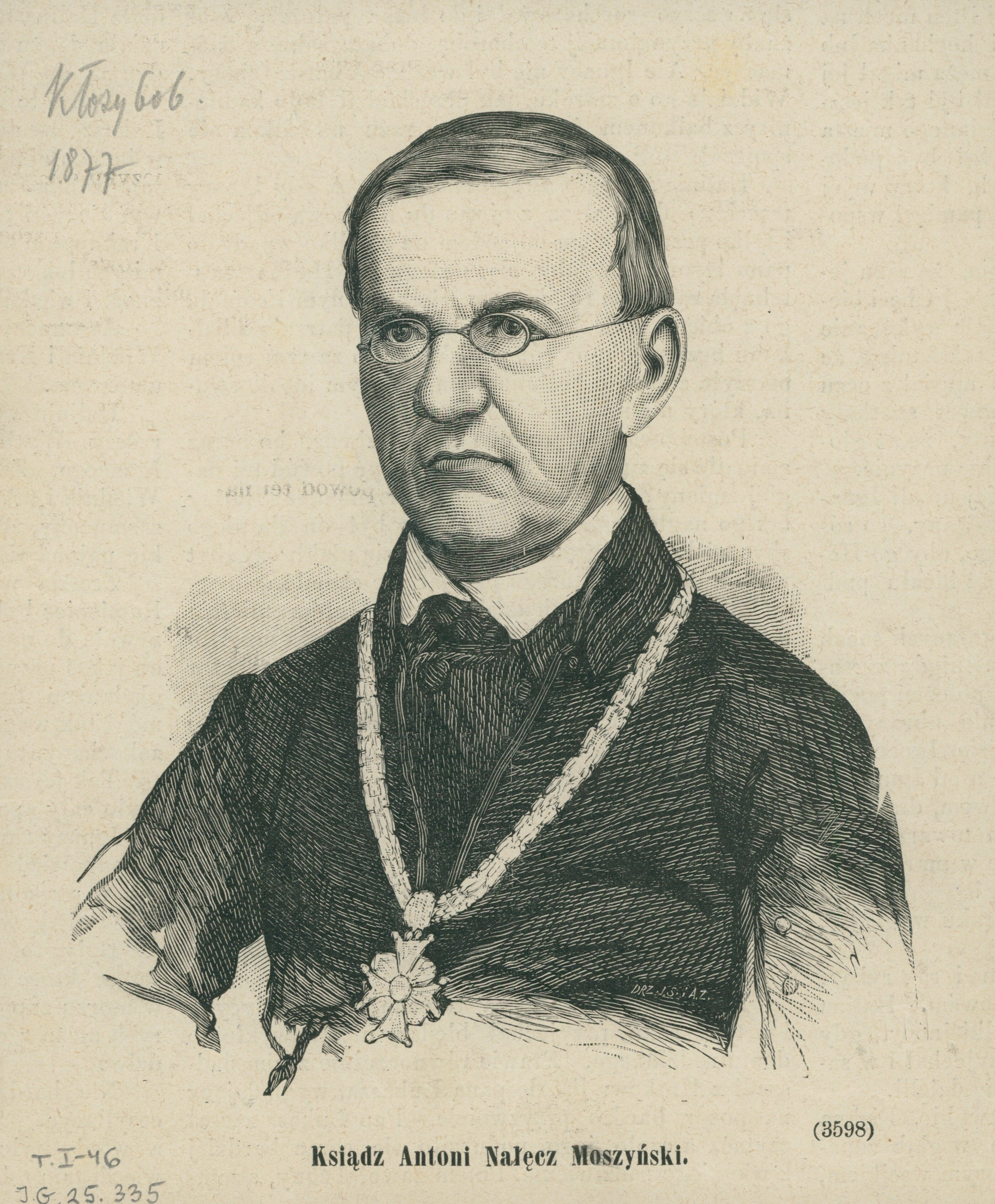 Antoni Moszyński